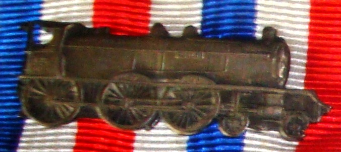 Agrafe de la Médaille d'honneur des Chemins de fer (1913 à 1939)